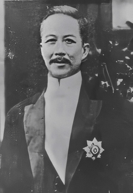 Lau Chu Pak (1867-1922)